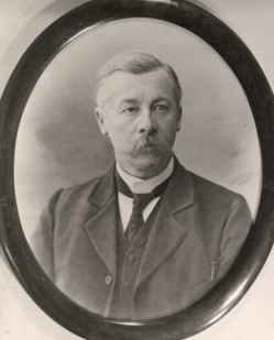 Karl Dehio